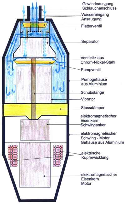 Schnittzeichnung einer elektromagnetischen Schwinganker-Membranpumpe zur Förderung aus Tiefbrunnen, Zisternen, usw.